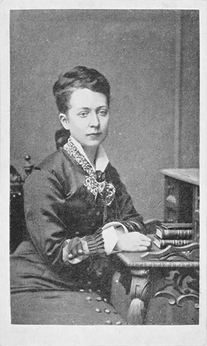 Hilma Angered-Strandberg (1855-1927)